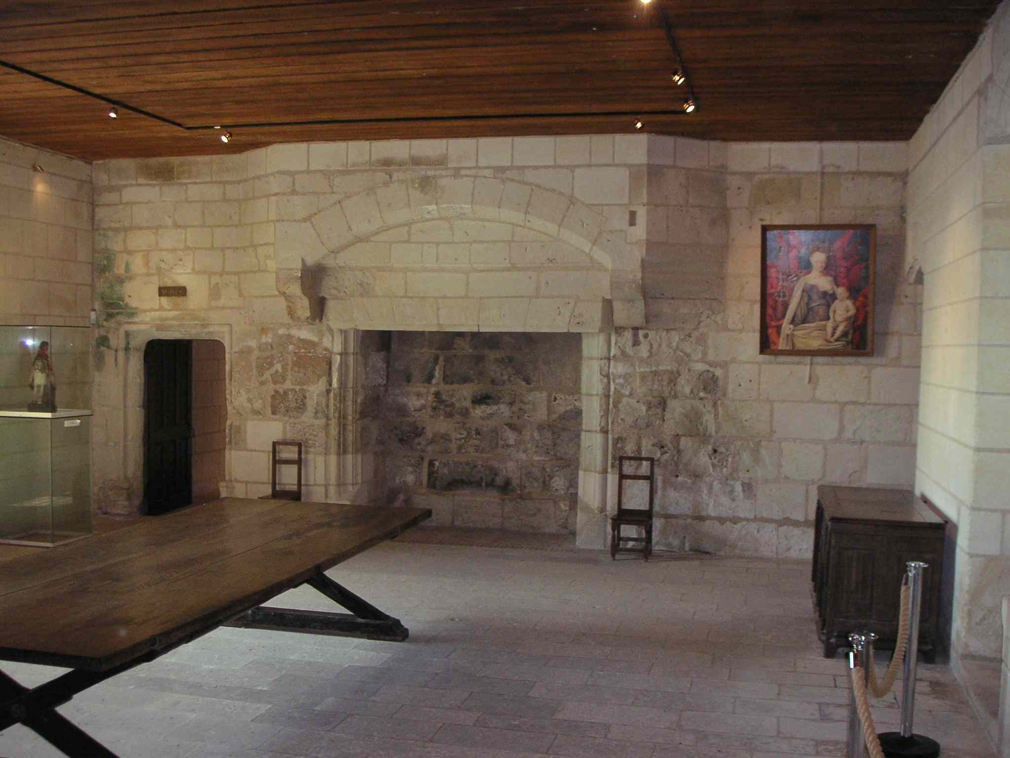 Intérieur des logis royaux au château de Chinon (France)